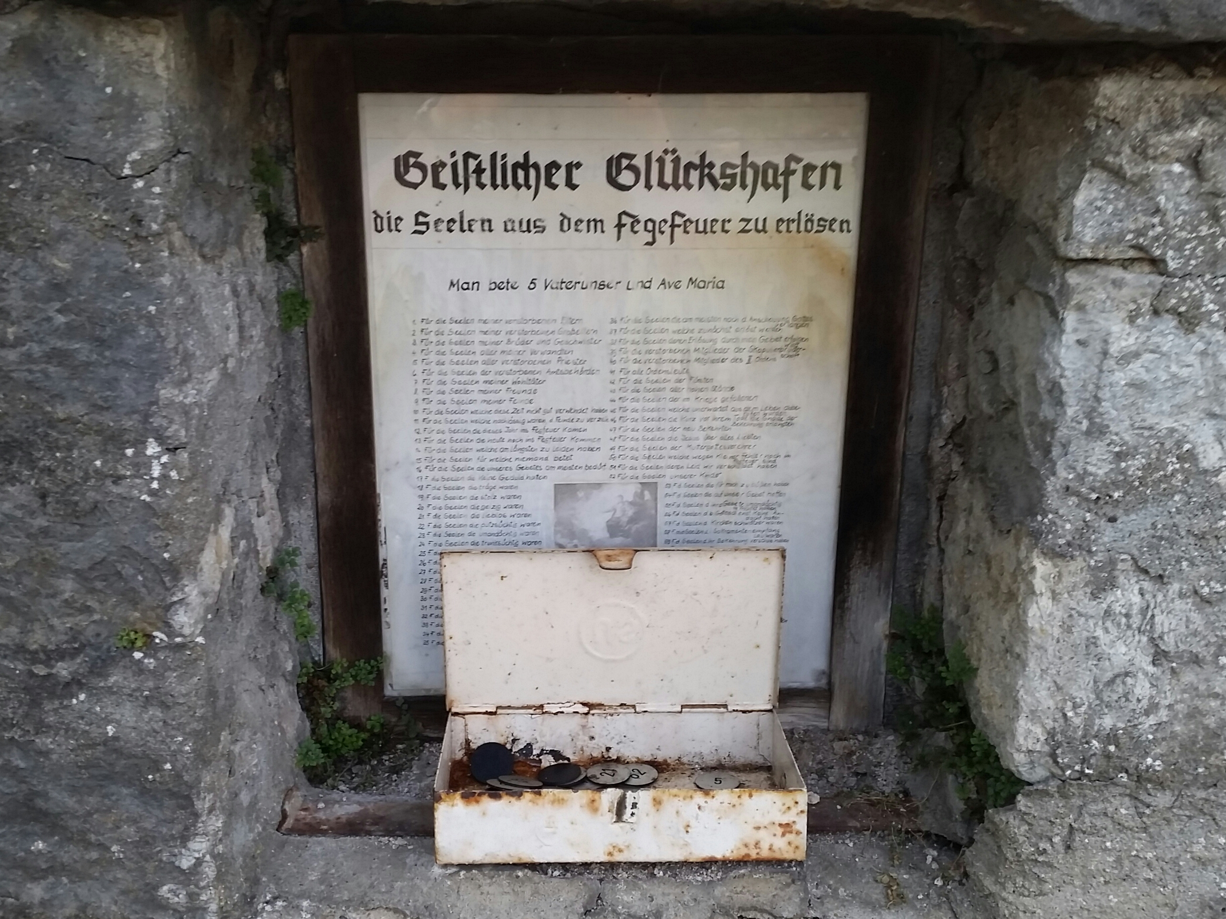 Geistlicher Glückshafen auf dem Friedhof in Acholshausen